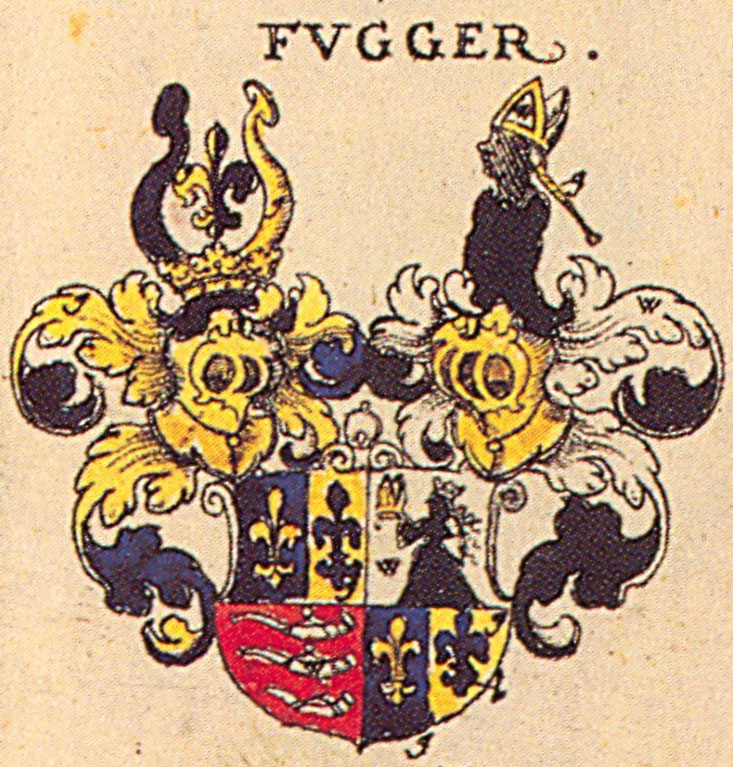 Johann Siebmacher: New Wappenbuch Herren und Freiherren Fugger